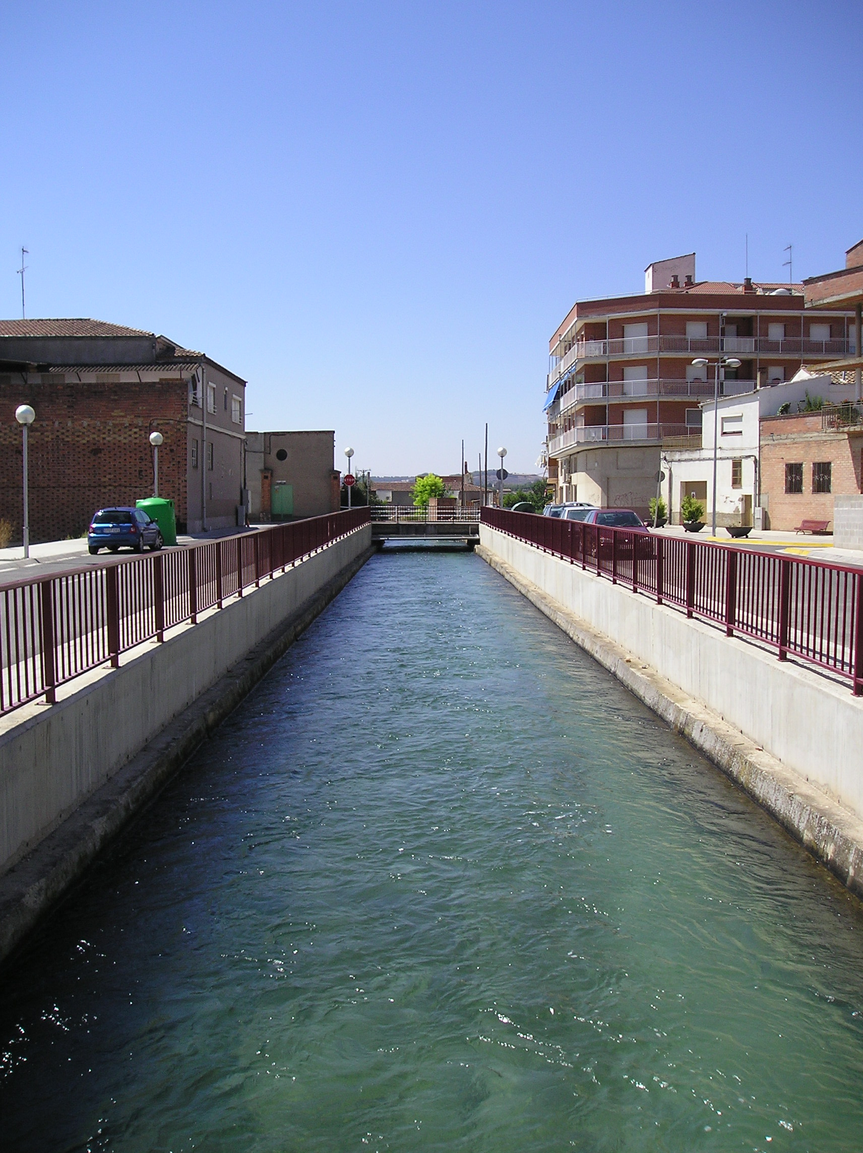 Canal de Pinyana en su paso por la localidad.